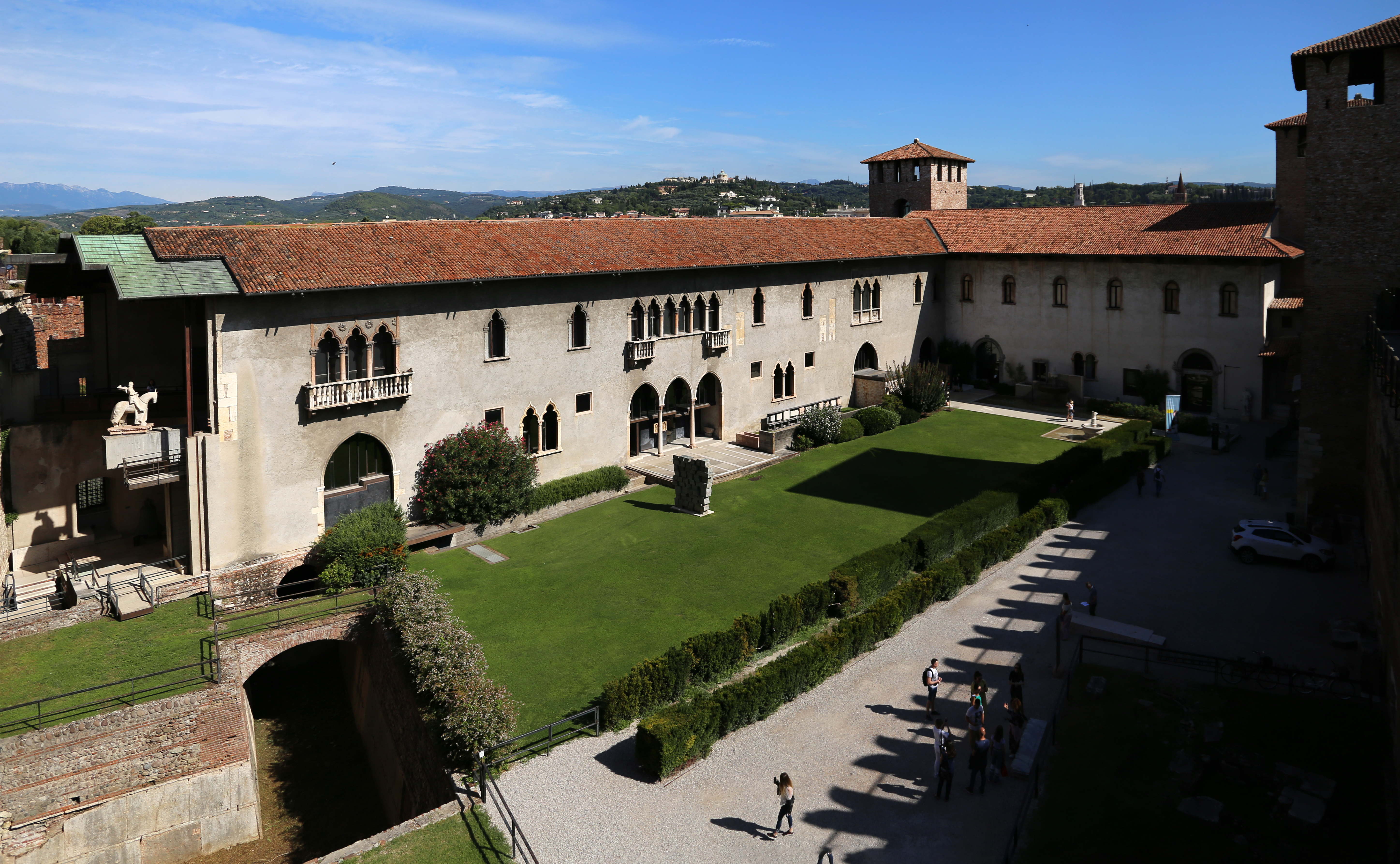 Museo di Castelvecchio This is a photo of a monument which is part of cultural heritage of Italy.